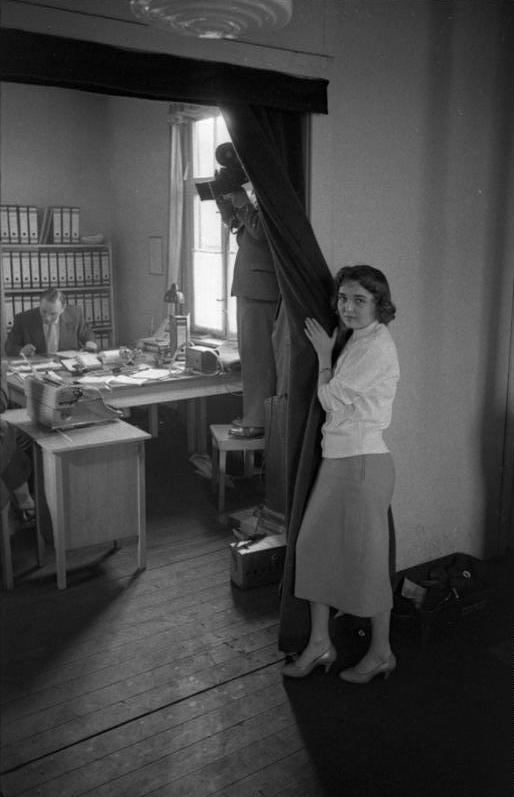 Lager Friedland Ankunft der Wissenschaftler aus Sochumi (beim Suchdienst des DRK) 12. Februar - 16. Februar 1958